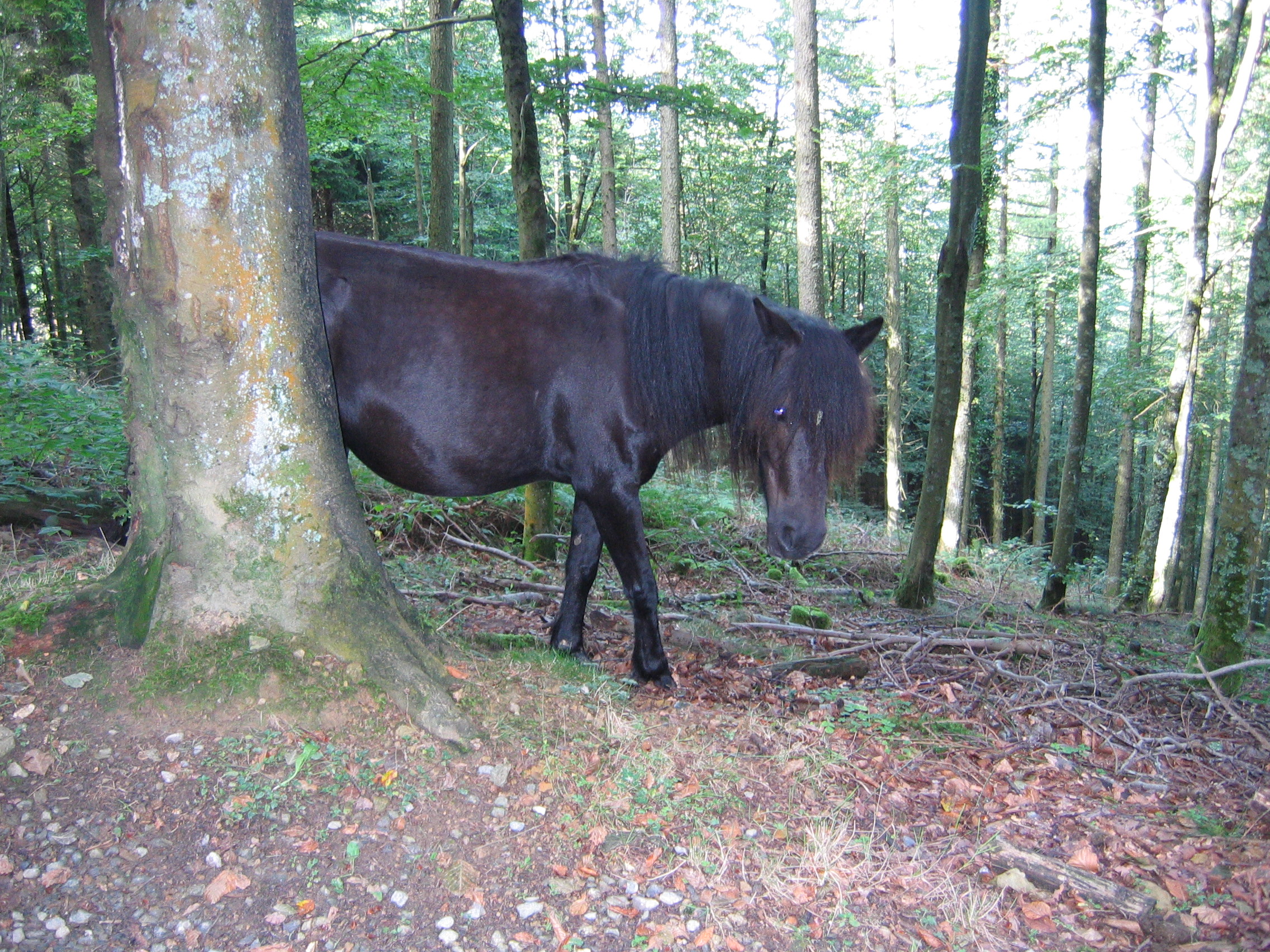 Pottoka izu bat basoan